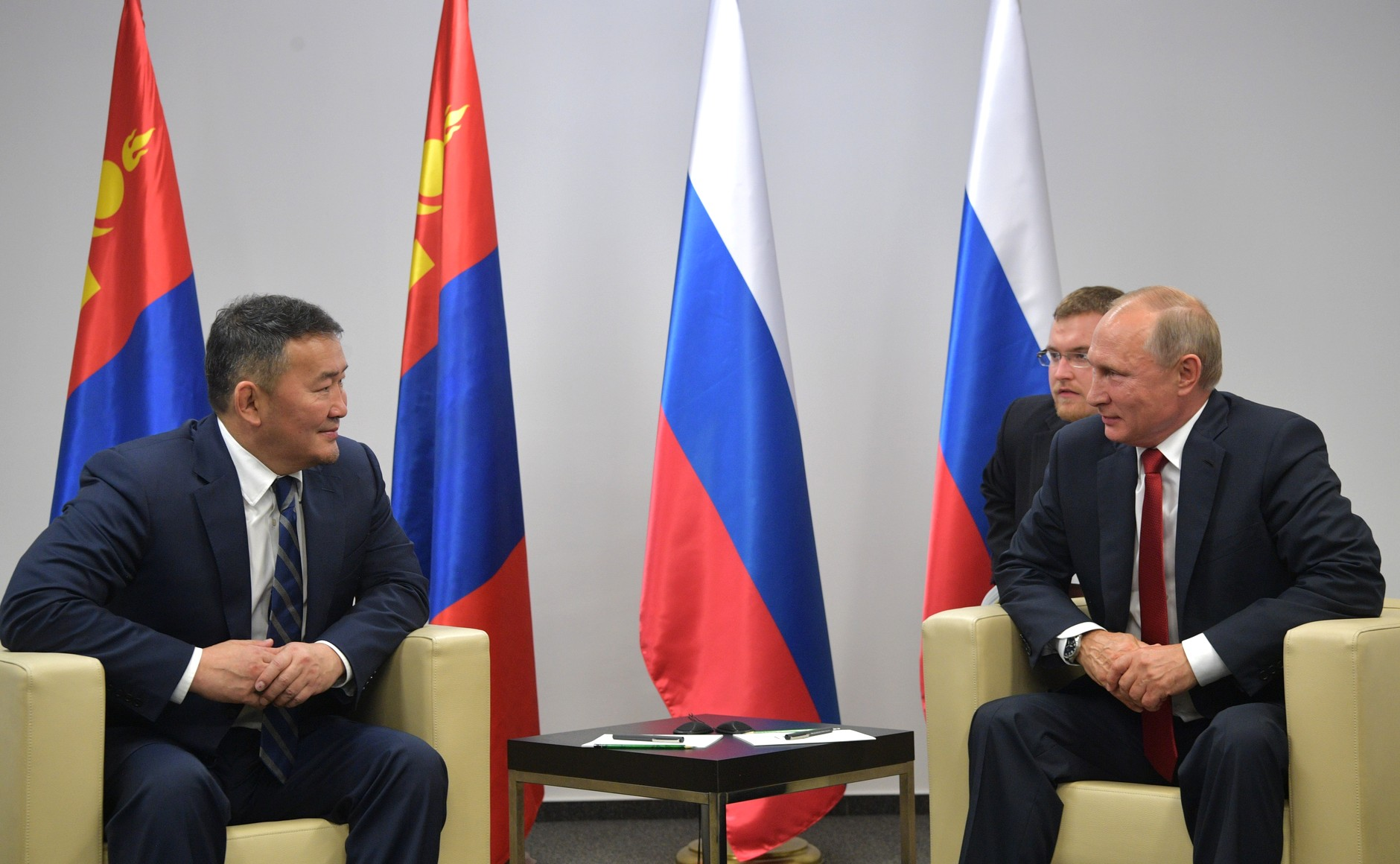 Встреча Президента России Владимира Путина с Президентом Монголии Халтмагийн Баттулгой